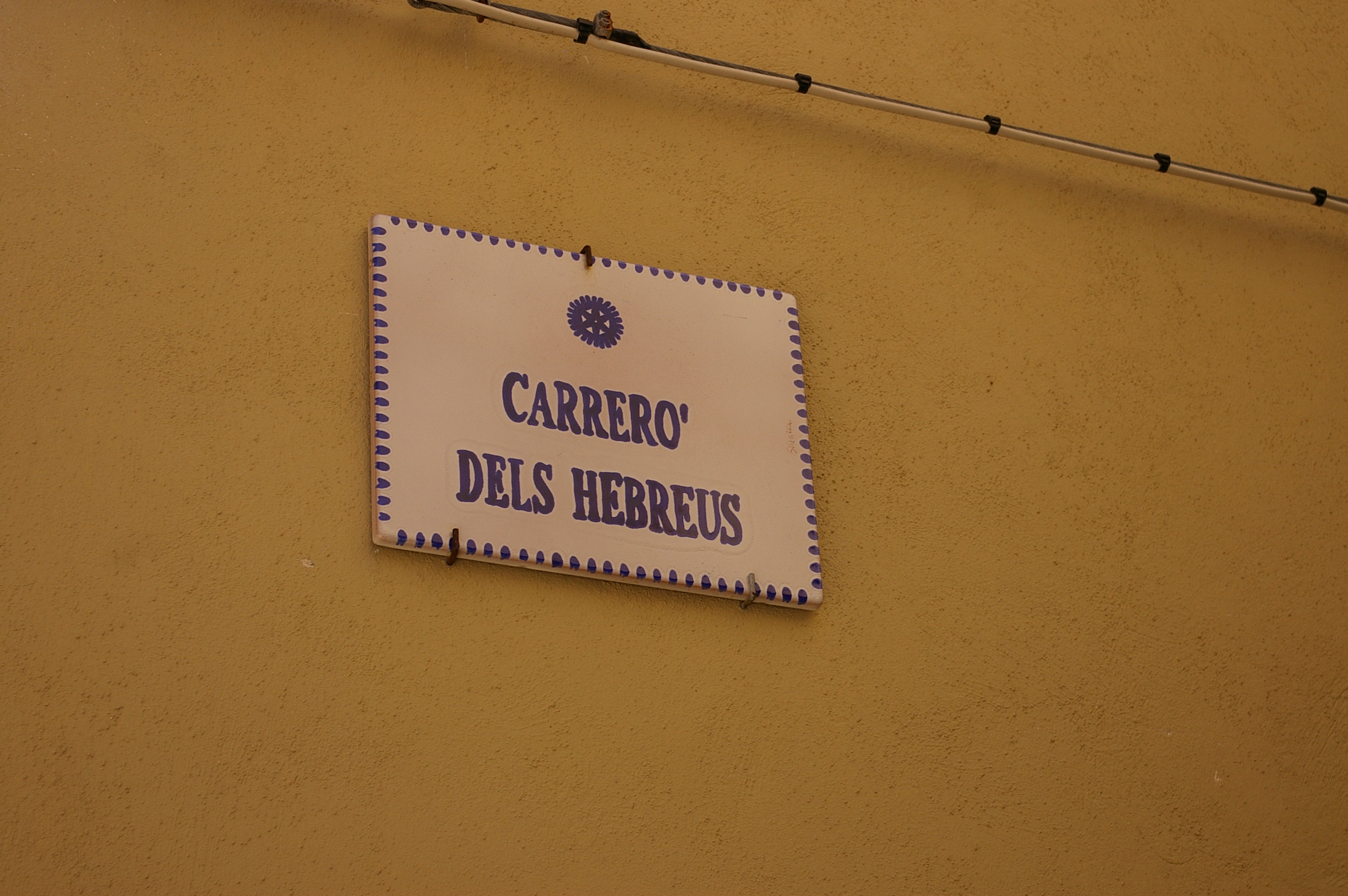 rue des Juifs à Alghero (Sardaigne) - souvenir d'avant l'expulsion de 1492, en catalan